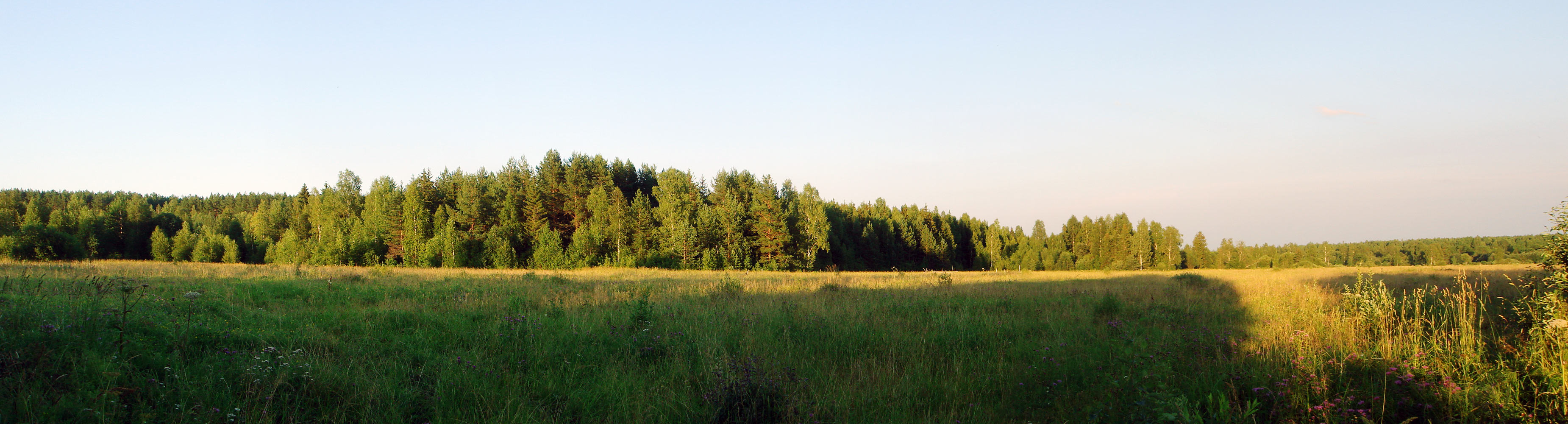 Поле и лес в Варнавинском районе Нижегородской области близ посёлка Красный Луч, Россия.